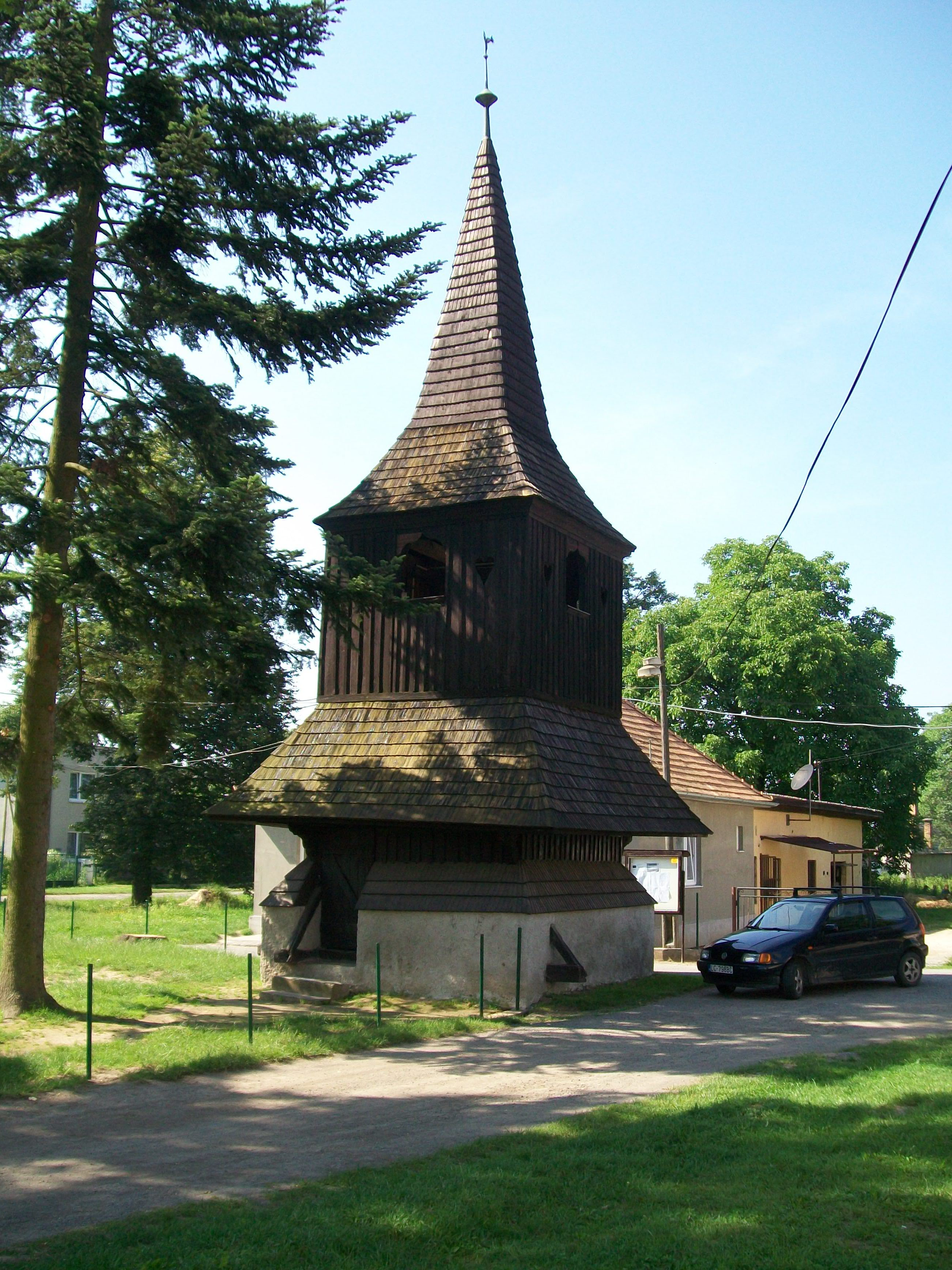 Drevená zvonica vyhotovená v roku 1791 (kultúrna pamiatka)